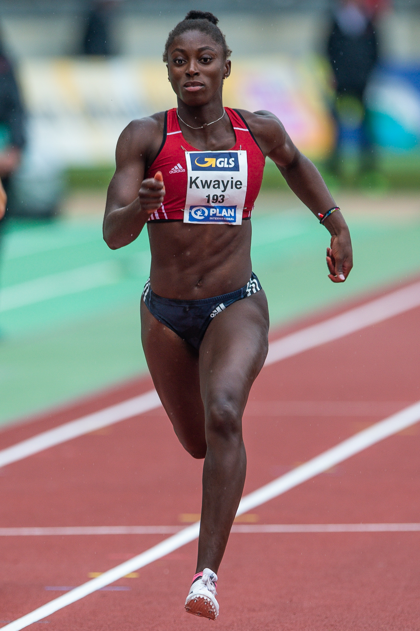 100-Meter-Lauf,100-metres race,DLV,Deutsche Leichtathletik Meisterschaften 2018,Deutscher Leichtathletik-Verband,Lisa Marie Kwayie,Max-Morlock-Stadion,Neuköllner SF